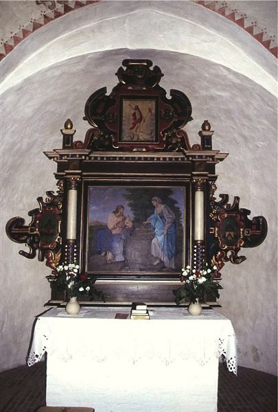 Lihme Kirke, (Skive Kommune), Altertavle